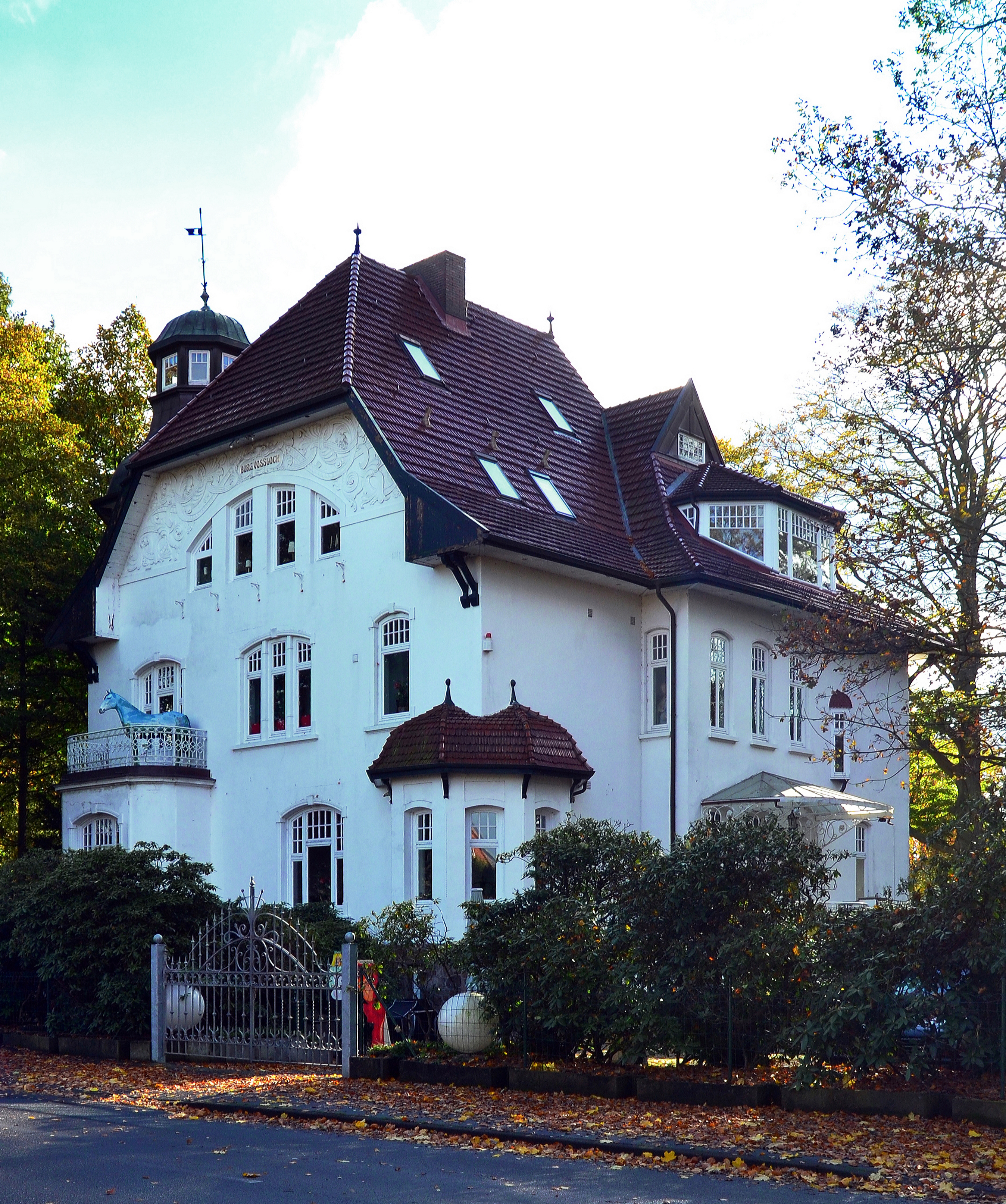 Die Jugendstilvilla Sesiani „Burg Vossloch“ in Bockhold-Hanredder